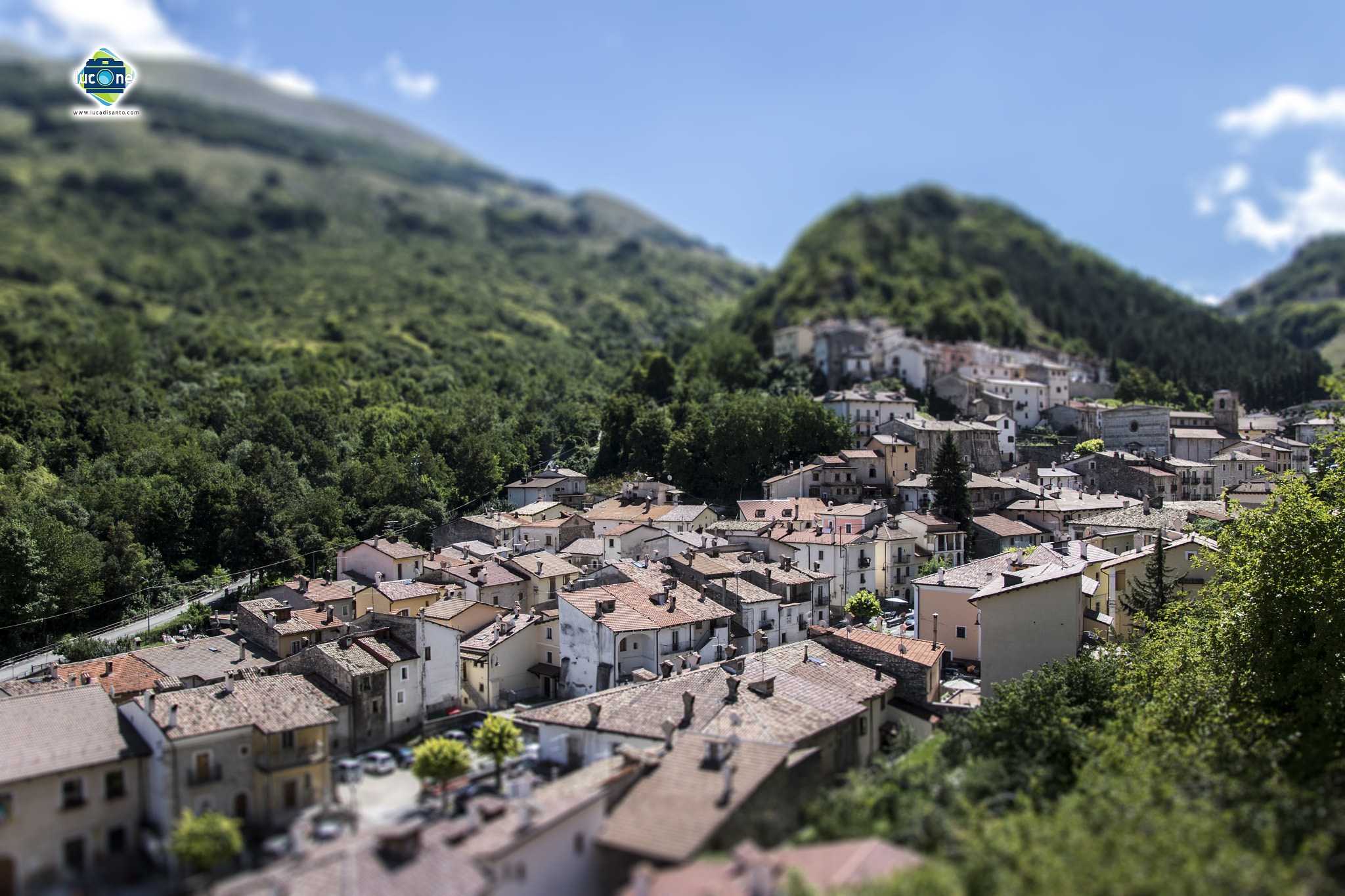 500px provided description: Rocca Pia (AQ) - ITALY - 2015 [#Abruzzo Italy ,#Italy ,#Vacation ,#Abruzzo ,#Tilt shift ,#Pia ,#Rocca ,#Rocca Pia]